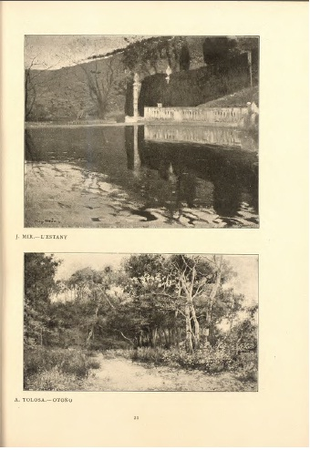 Ilustraciones de la revista modernista Hispania